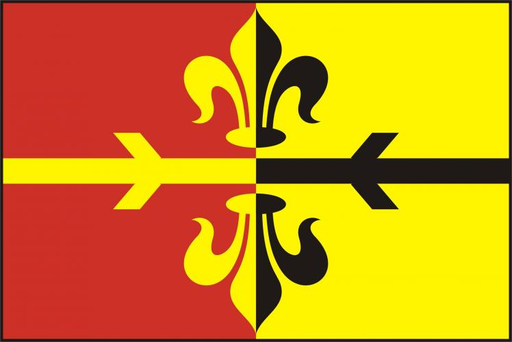 vlajka, Okna, okres Česká Lípa